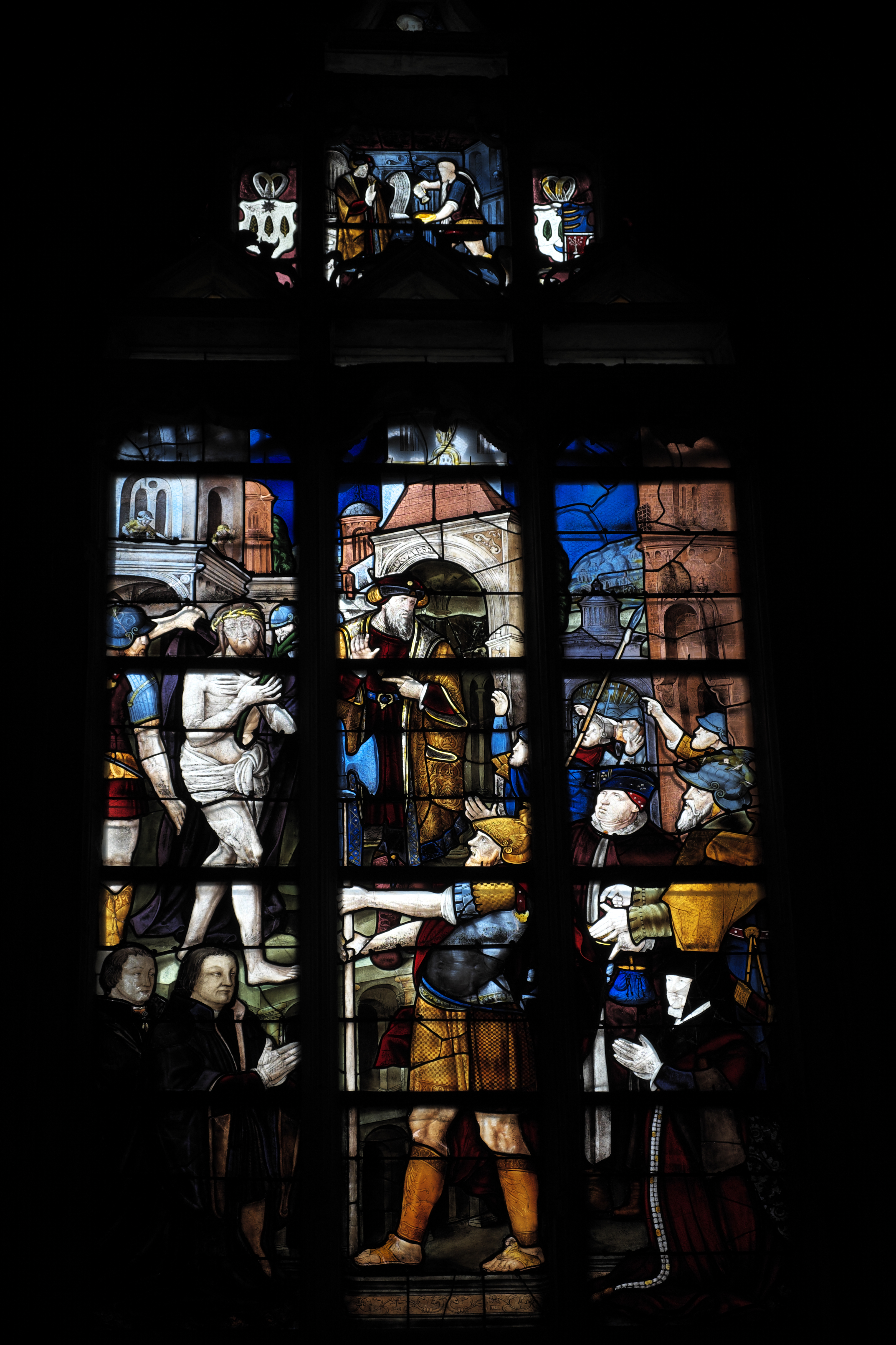 Katholische Pfarrkirche Notre-Dame-des-Marais in La Ferté-Bernard im Département Sarthe (Pays de la Loire/Frankreich), Bleiglasfenster (baie 22), um 1540, von Léopold Charles 1851 restauriert; Darstellung: Verspottung Jesu